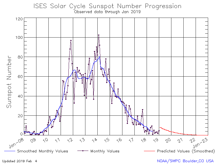 Ciclo solar actualizado al 2019